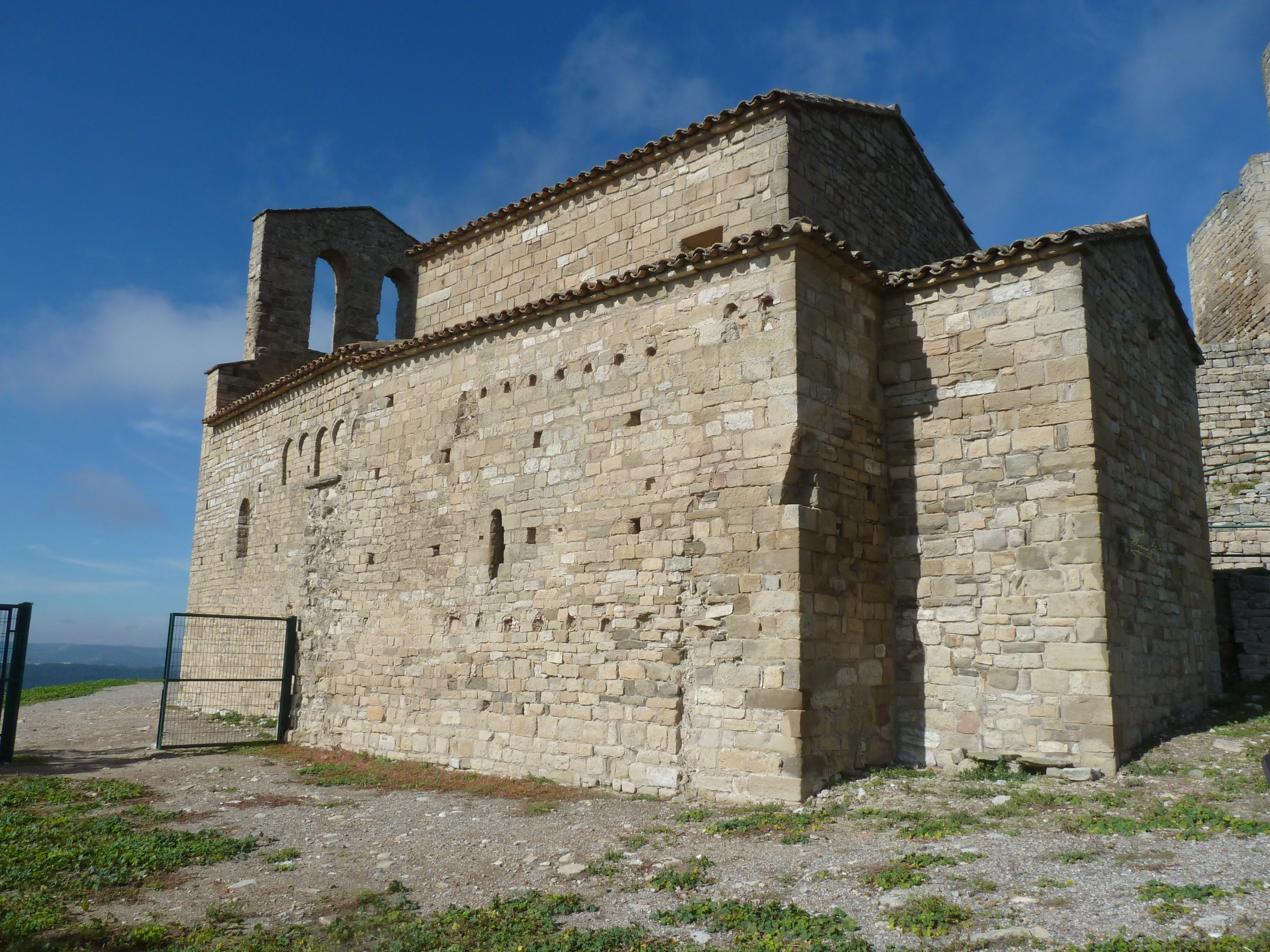 Església de Sant Pere de Boixadors